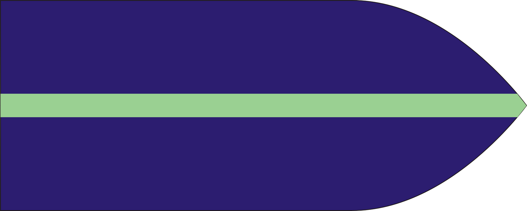 Barwy 2 Brygady Strzelców Pieszych Polskich Sił Zbrojnych na Zachodzie